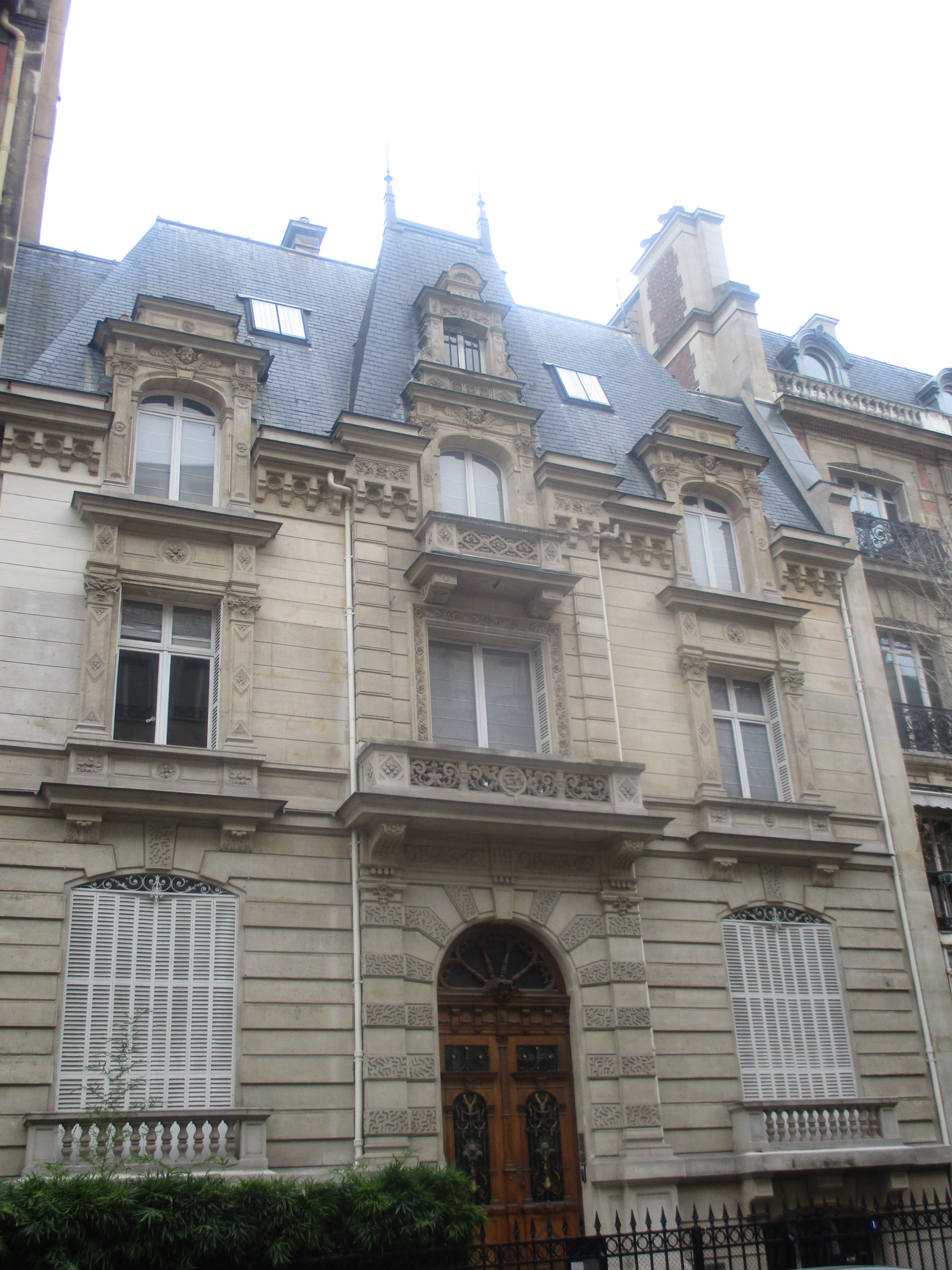 Hôtel particulier au 1 rue Rembrandt, Paris VIIIe, construit par Ziegler pour le baron Baeyens.